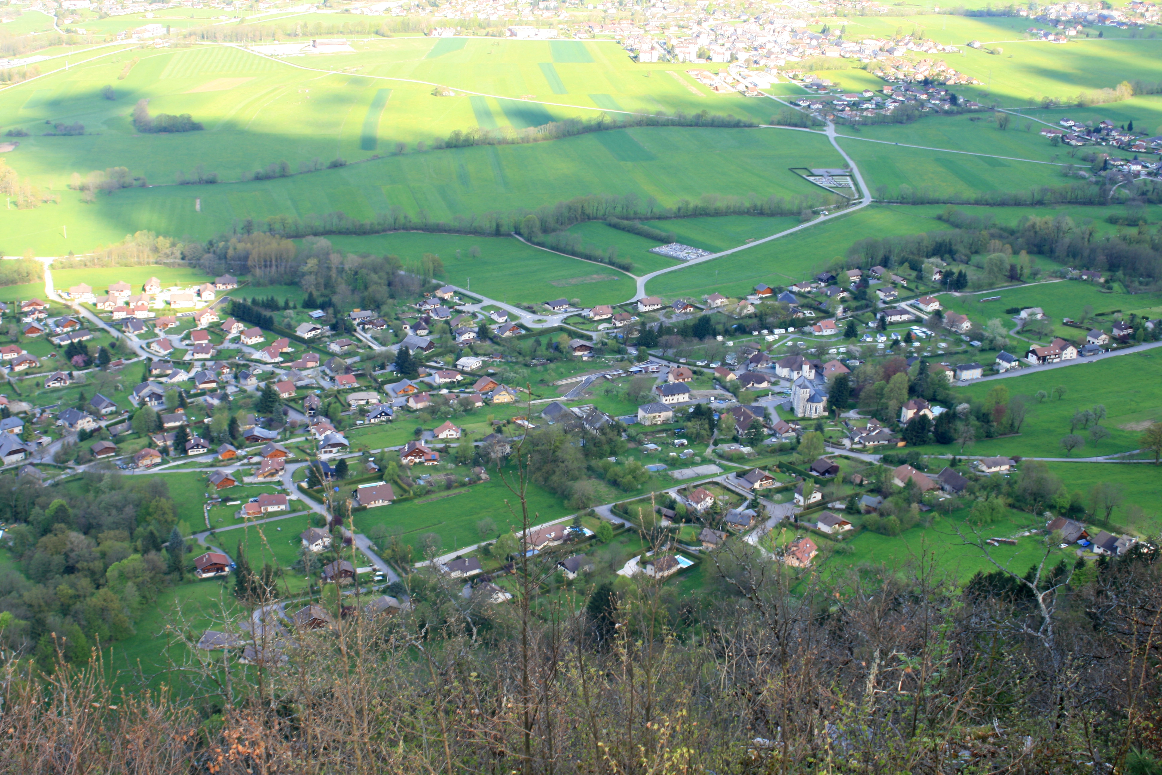 Lathuile, centre du village depuis le Taillefer